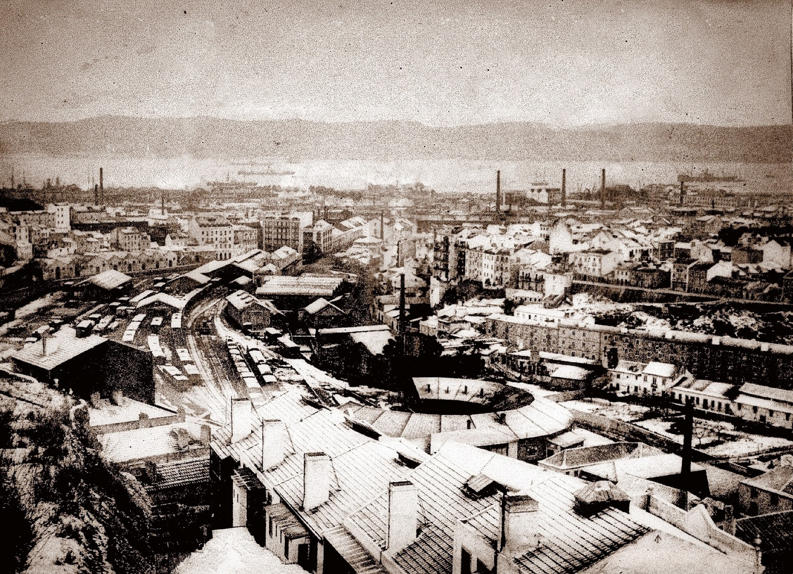 Neve em Lisboa na manhã do dia depois do Natal, em 1926: Vista dos Prazeres para Alcântara.